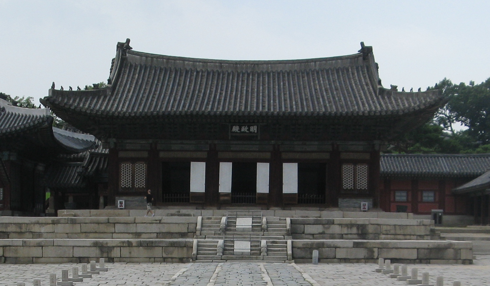 Photographie du (Myeongjeonjon 명전존), salle du trône du g (Changgyeonggung 창경궁)